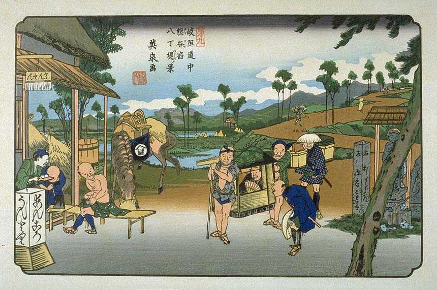 Kumagai on the Kisokaido, ukiyo-e prints by Keisai Eisen